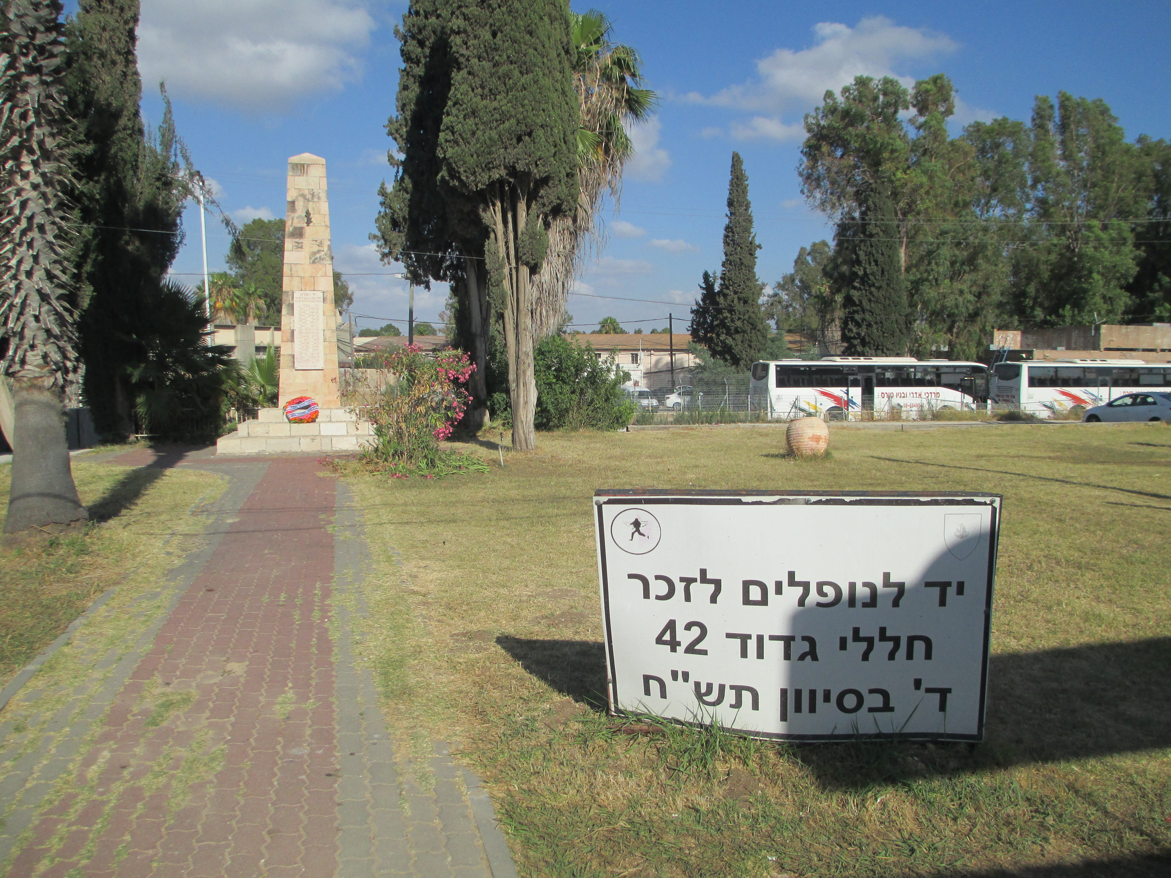 אנדרטת זיכרון לגדוד 42 בצריפין